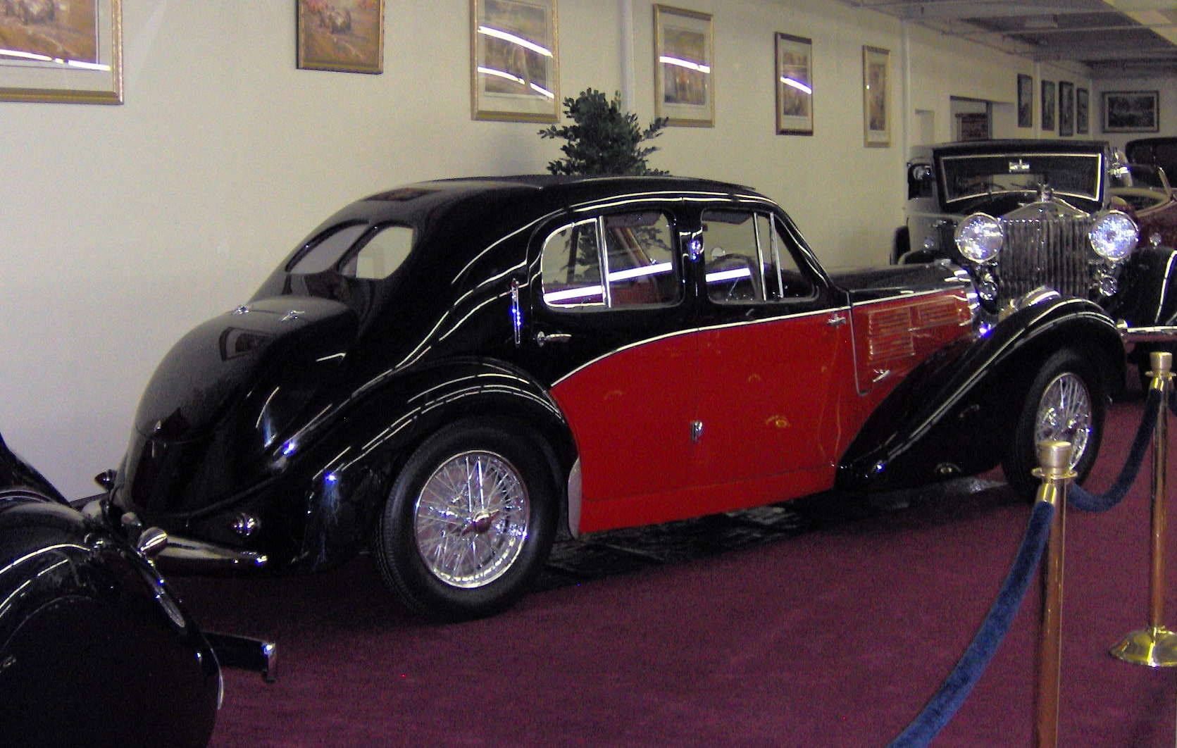 1939 Bugatti Type 57C Galibier Saloon